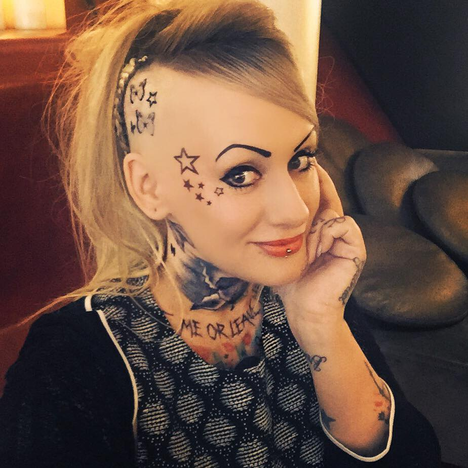 In Berlin 2015